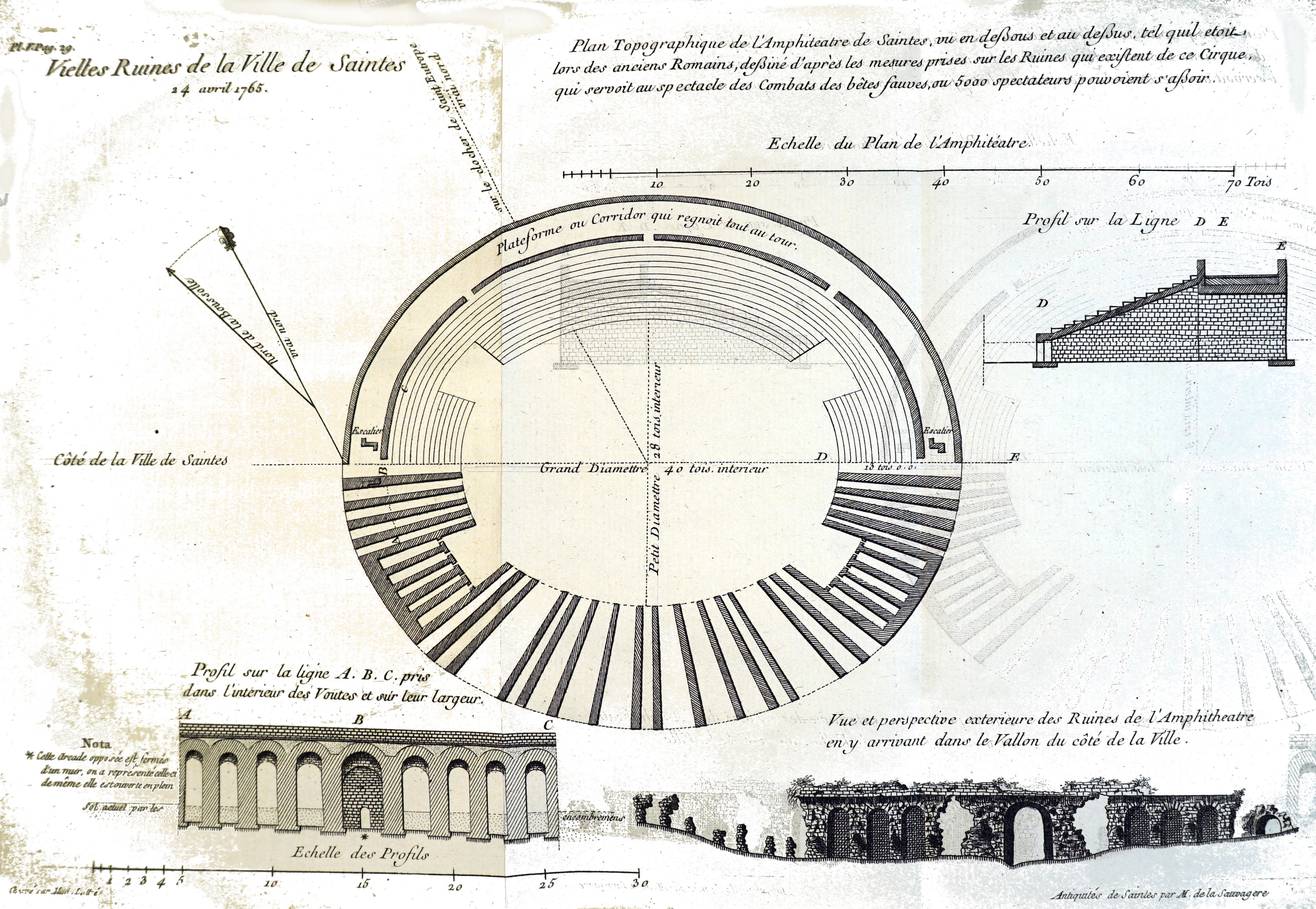 extrait de "Recueil d'antiquités dans les Gaules...".